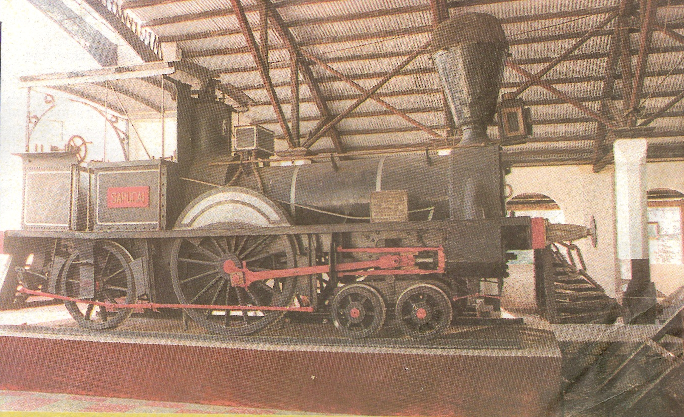 La locomotora "Paraguay" fue la primera en realizar un recorrido en las vías del país en 1861. Hoy se conserva como una reliquia en la estación Central en Asunción